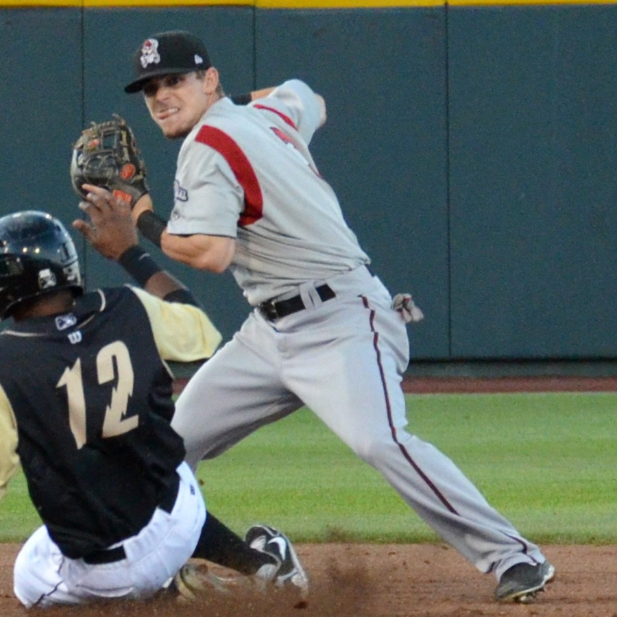 Scooter Gennett